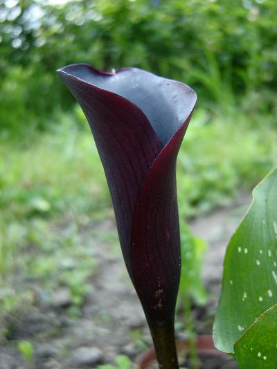 Zantedeschia 'Eclipse'